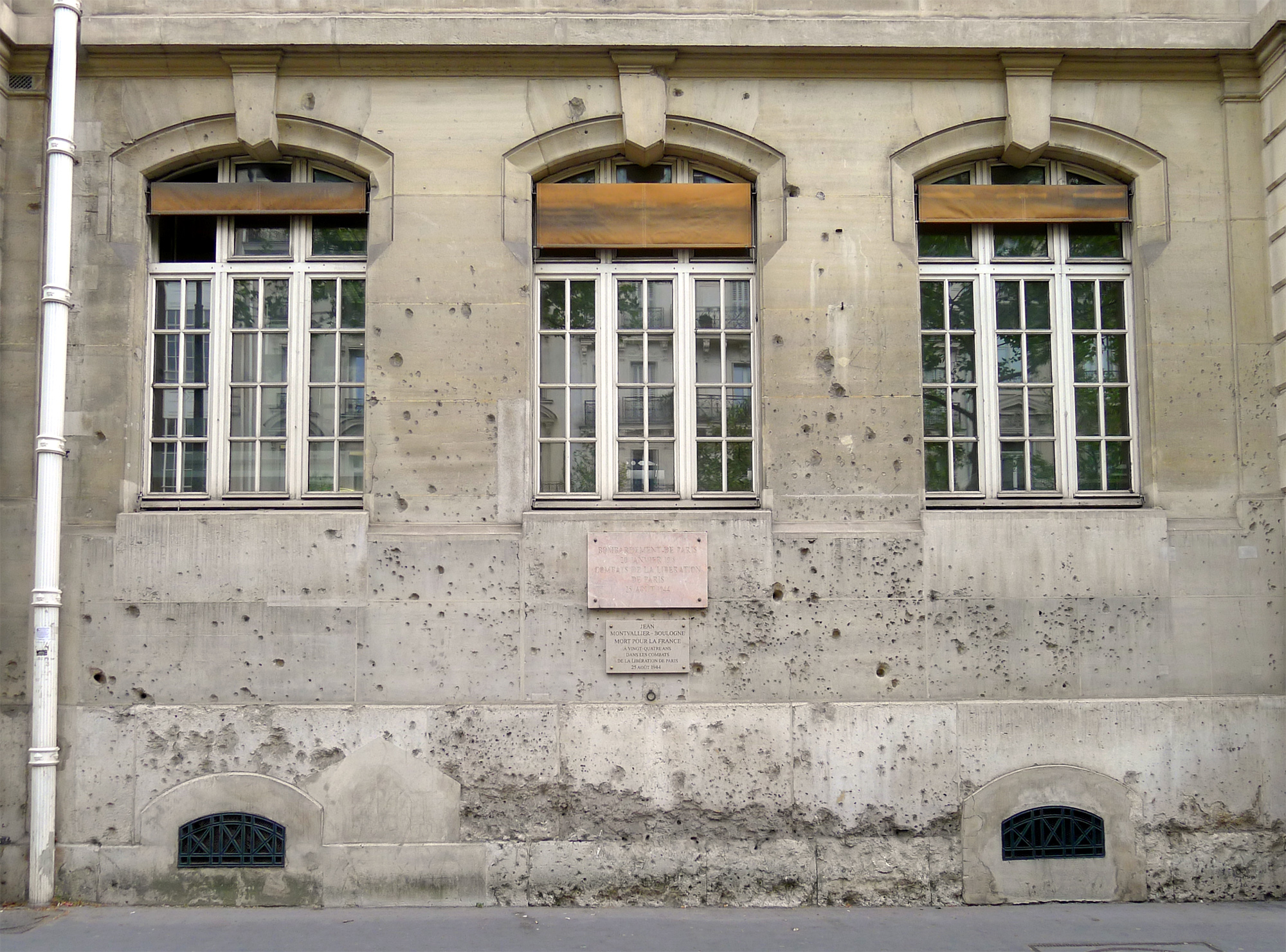 Boulevard Saint-Michel (n°60 : façade de l'école supérieure des Mines) - Paris VITraces d'impacts de balles laissées lors des combats de la libération de Paris (25 août 1944)